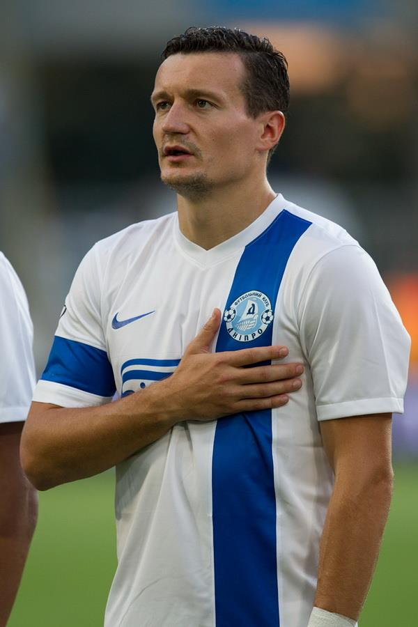 Артем Федецький - футболіст Дніпра